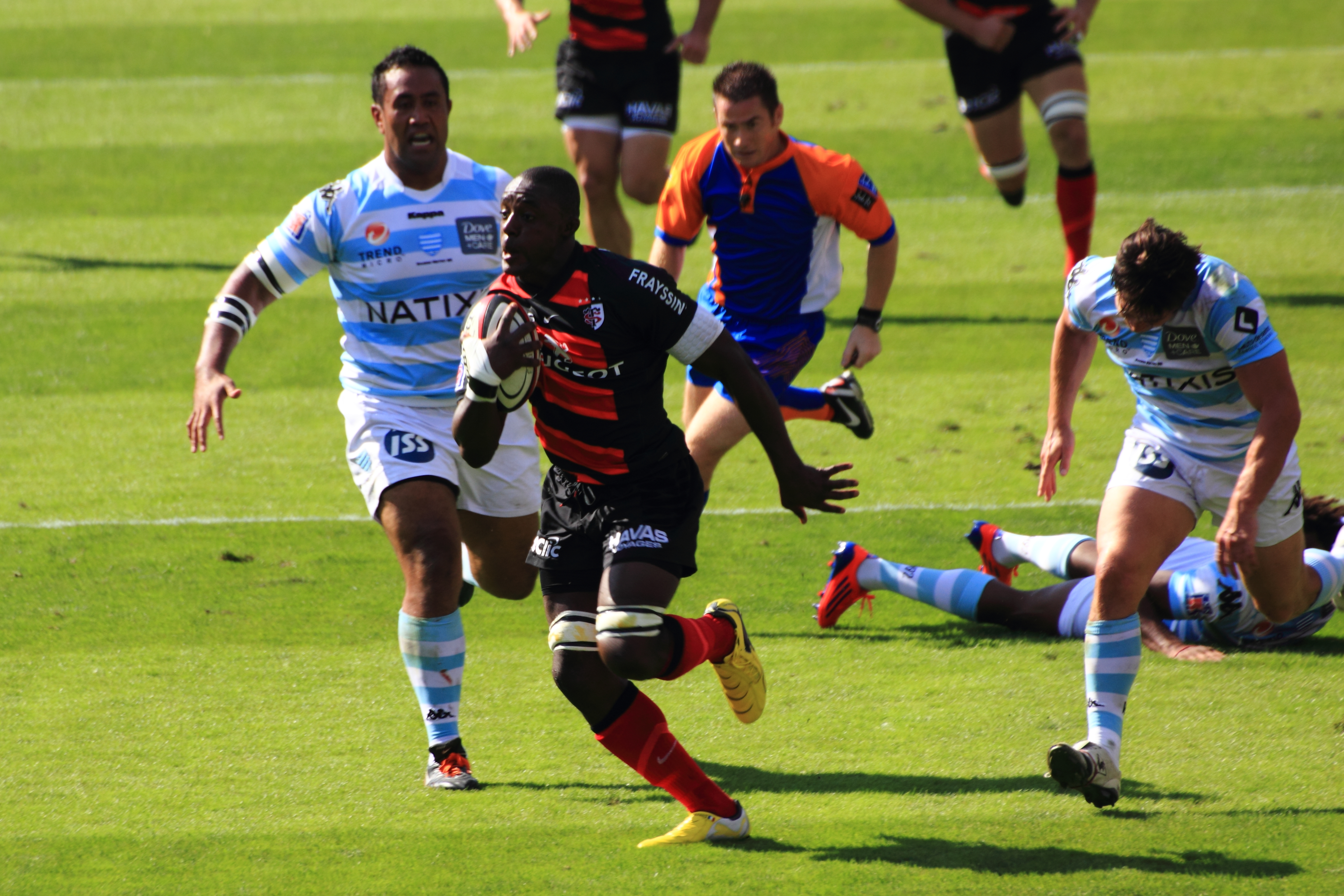 Nynga court vers la ligne d'en-but du Racing Métro 92